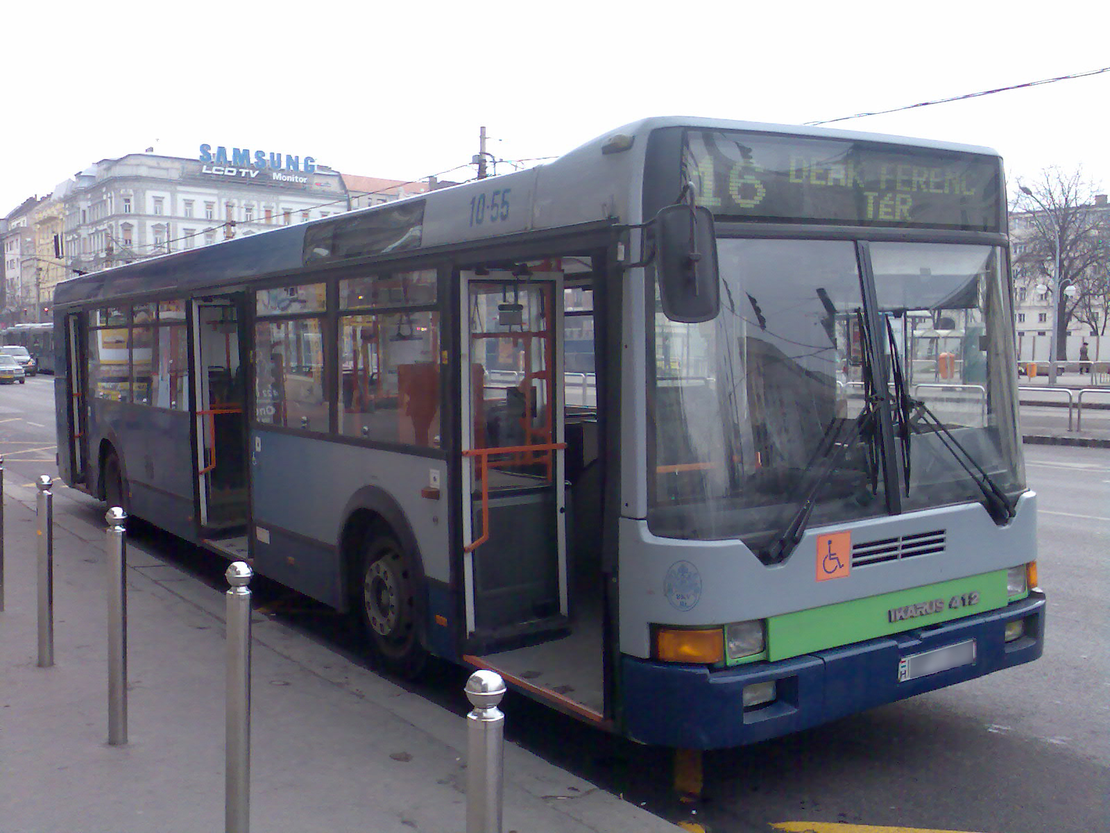 A BKV BPI-055 rendszámú, típushiba miatt leégett, majd helyreállított IK-412-ese (Budapest, V. ker., Deák Ferenc tér). A busz hátsó szélvédője, és FOK-Gyem kijelzője a mai napig hiányzik, helyette megnagyobbított motortér található.